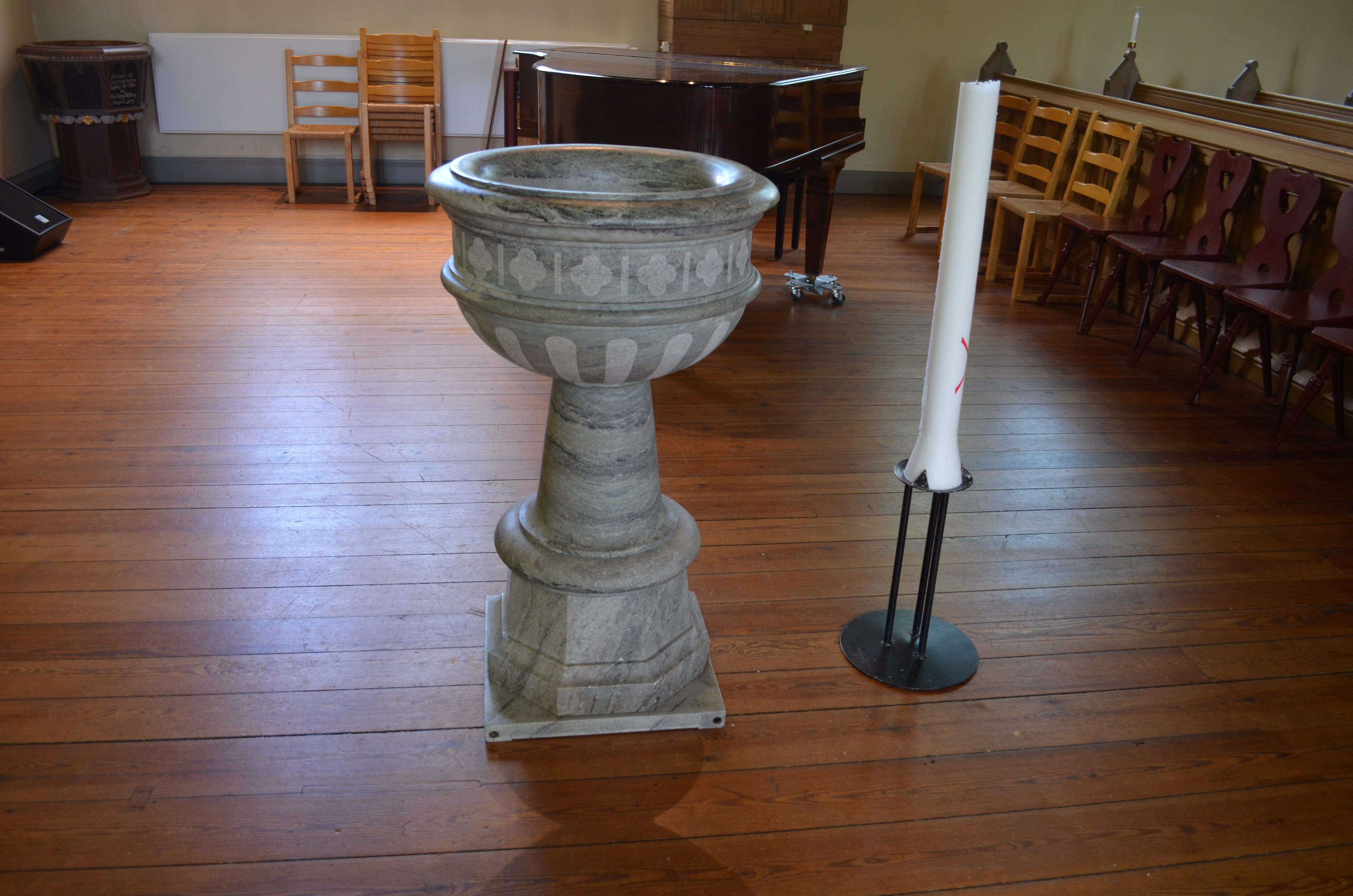 Dopfunten